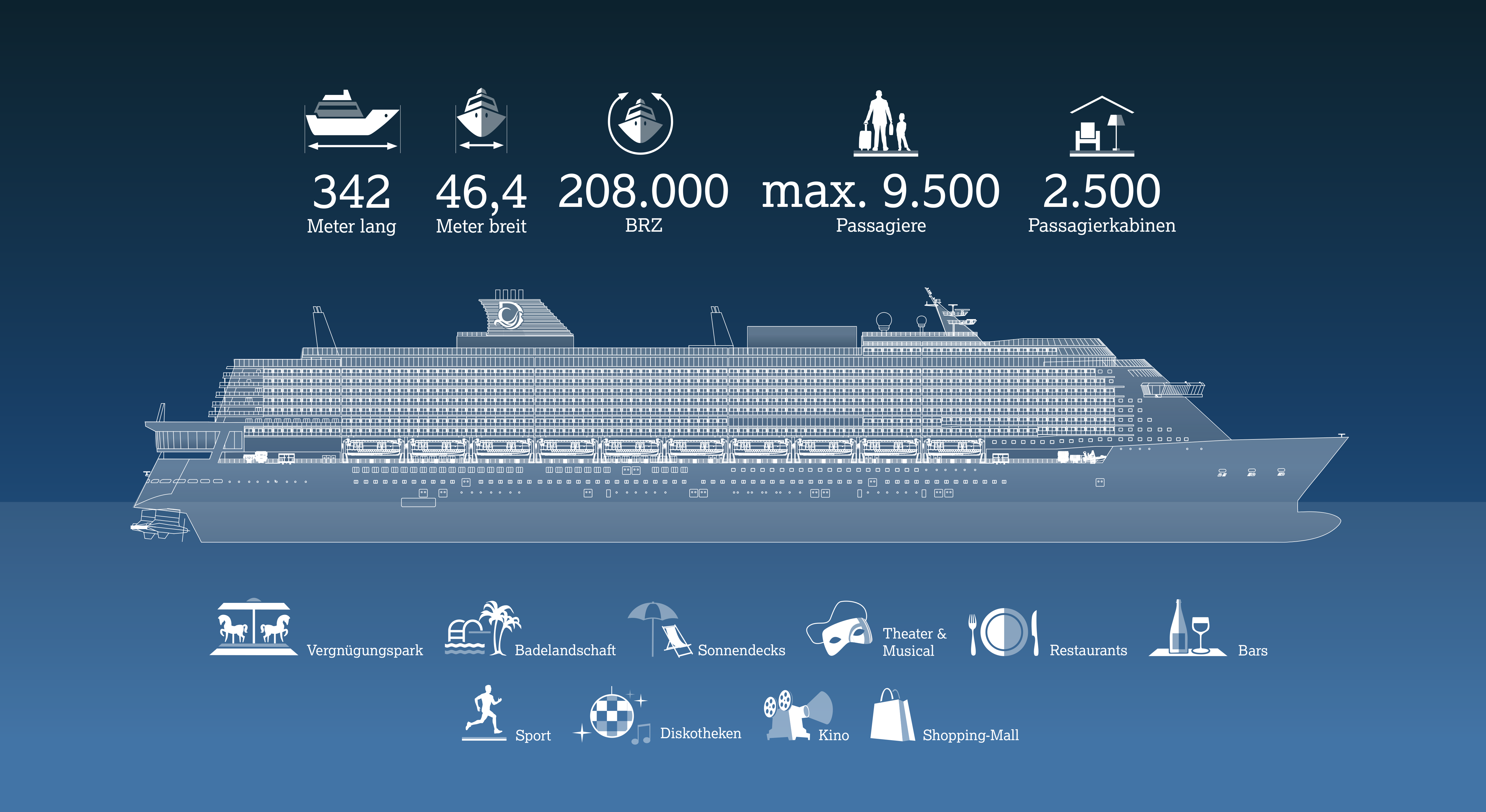 Infografik zur Global Dream